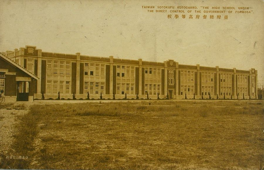 台北高等學校。照片中建築物為二層樓，尚未加蓋三樓。